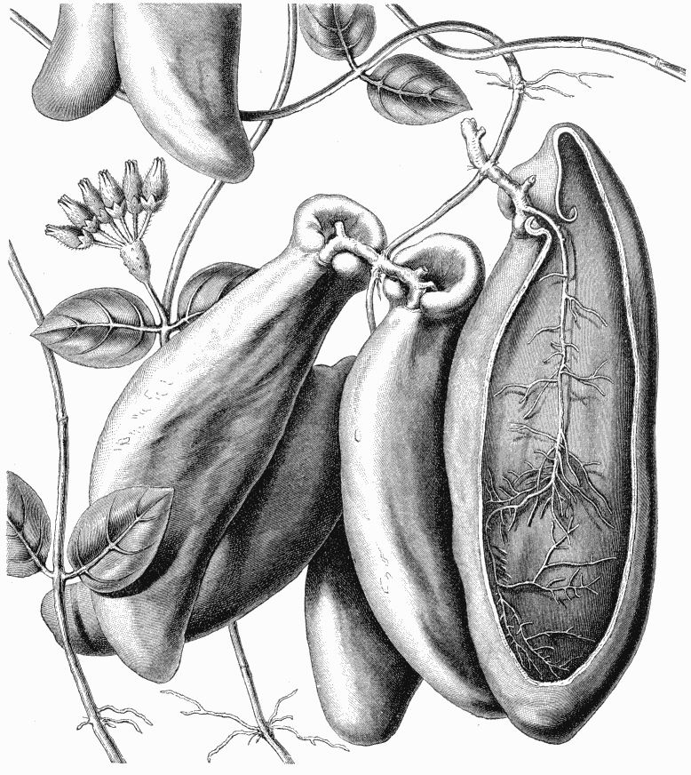 Dischidia rafflesiana (förgrenade rötter synas i det ituskurna krukformade bladet).